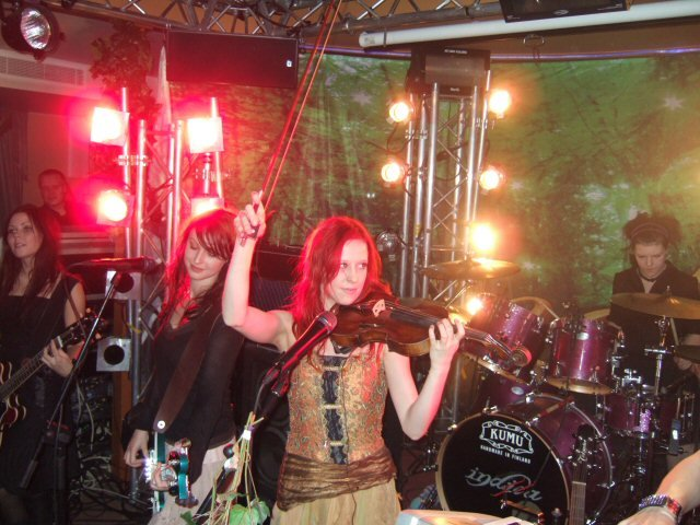 Indica keikalla, kuvasta puuttuu Sirkku